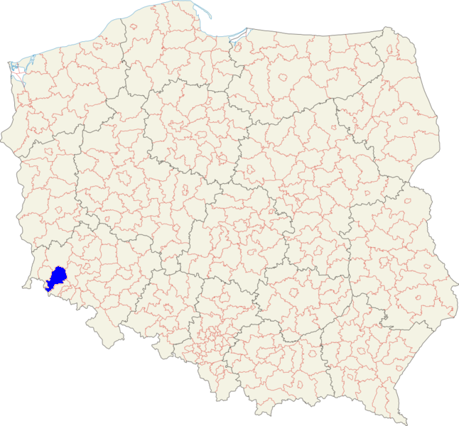 Mapa administracyjna Polski z zaznaczeniem powiatu lwóweckiego.